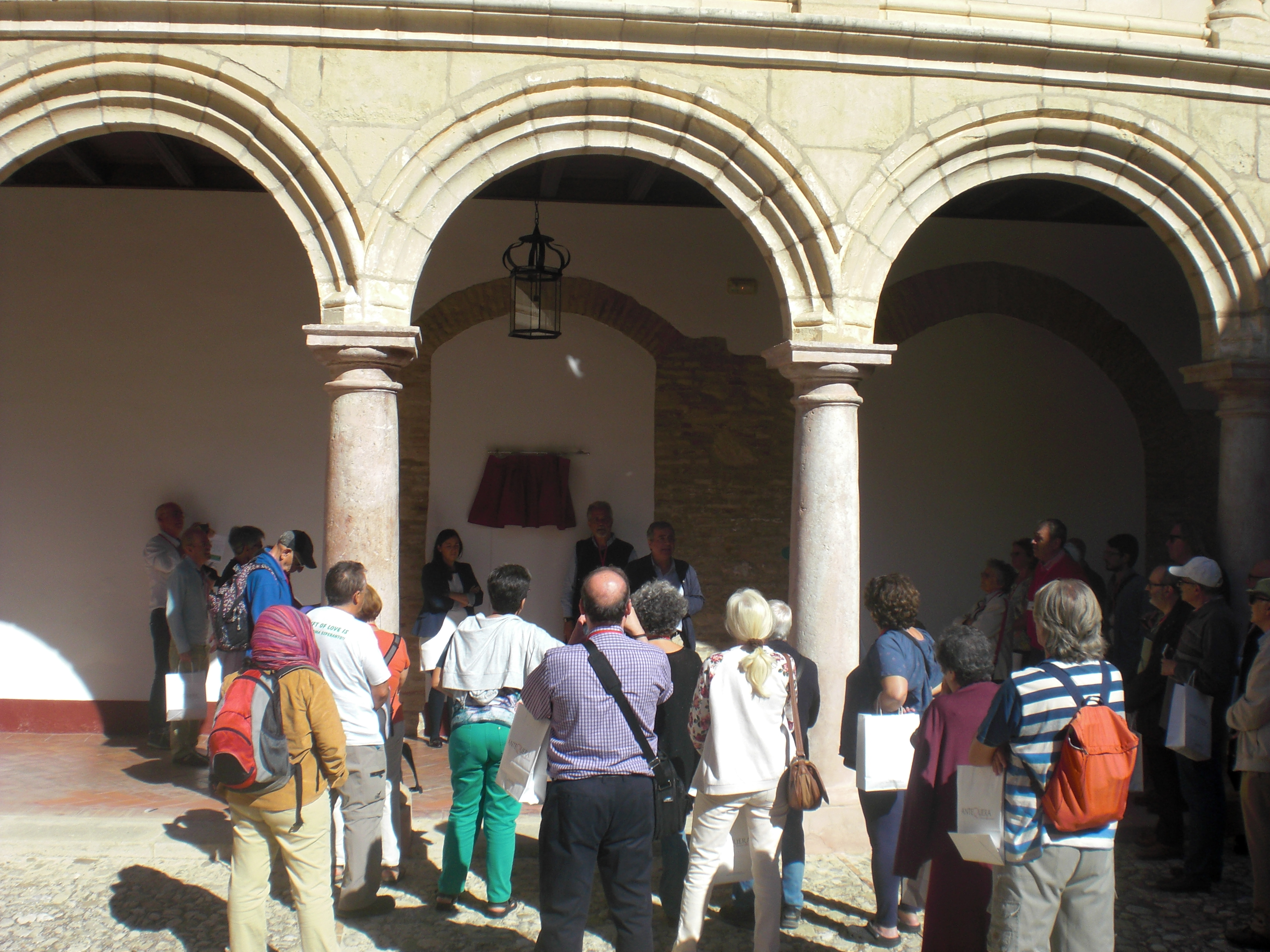 Omagxo al esperantisto Higinio García Gómez-Quintero en la Klostro de Sankta Zoilo